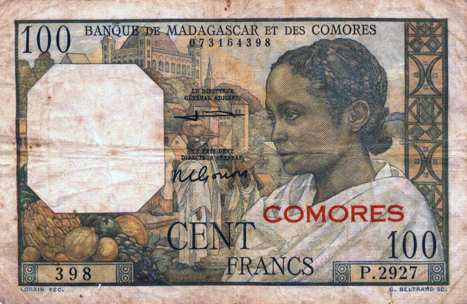 100 Francs der Komoren, Vorderseite